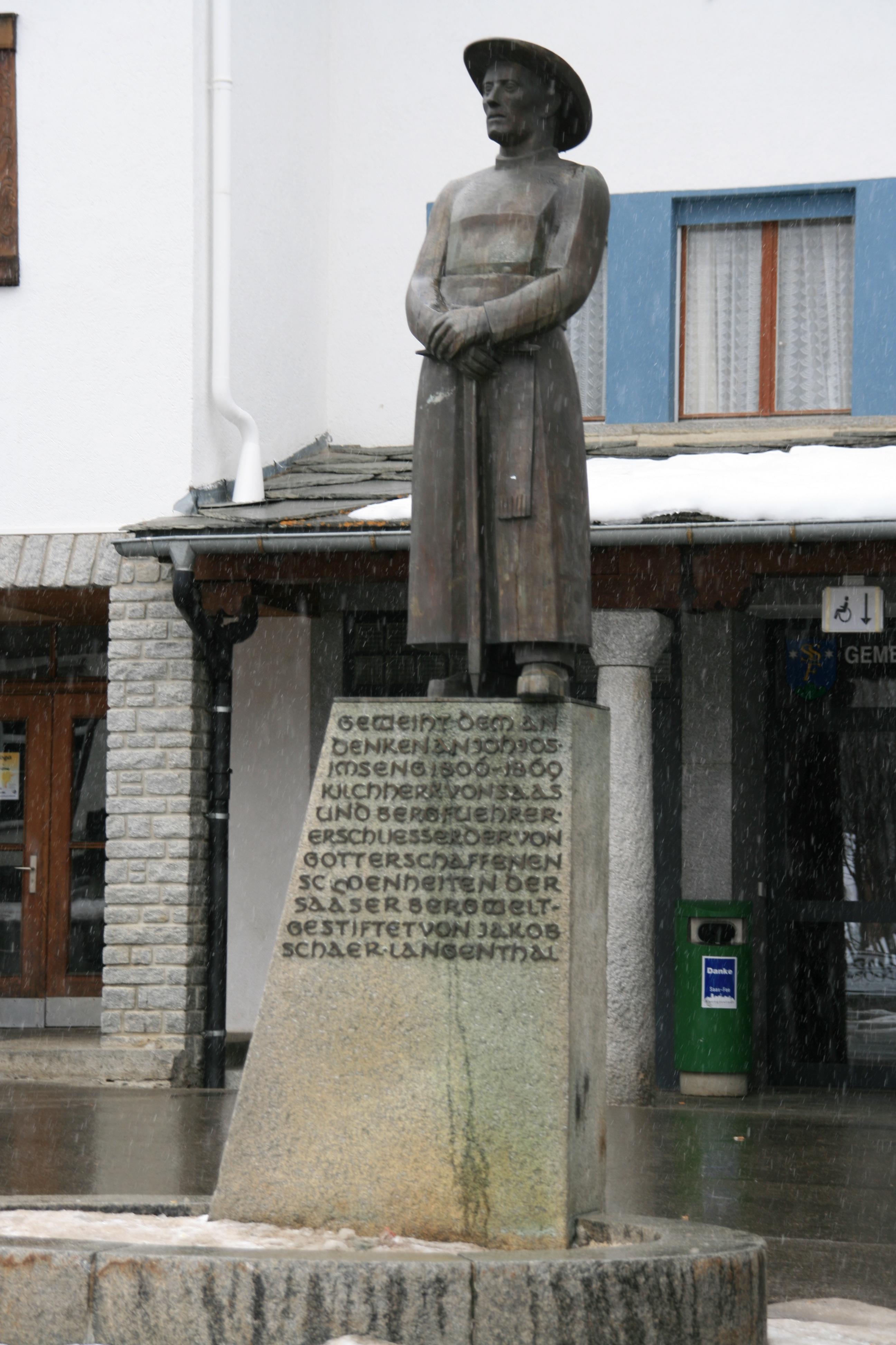 Statue von Johann Josef Imseng auf dem Dorfplatz von Saas Fee